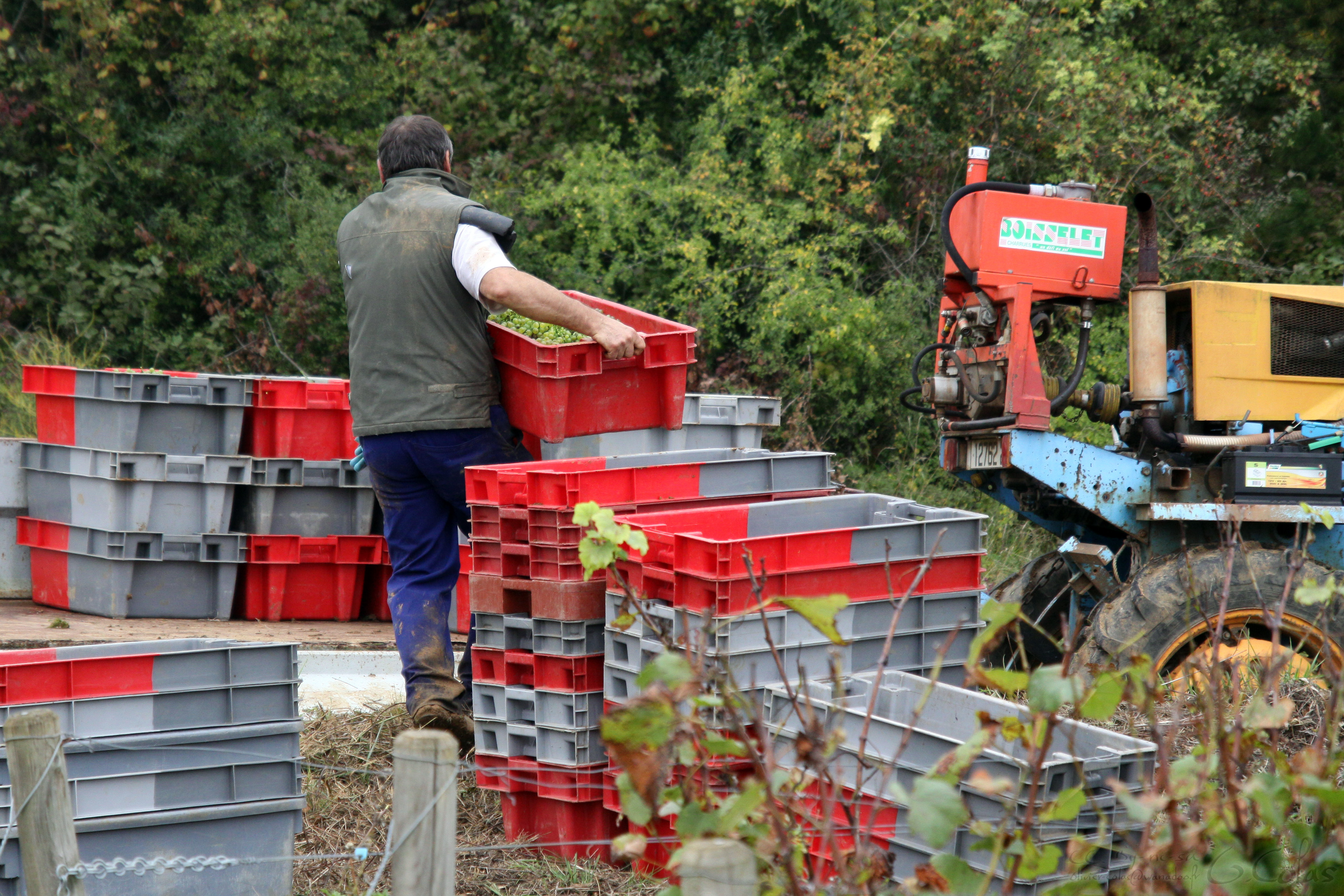 Vendange en caisses de 30kg pour limiter l'écrasement. Les caisses s'encastrent les unes au dessus des autres sans abimer le raisin. Pernand-Vergelesses, 30 Septembre 2011